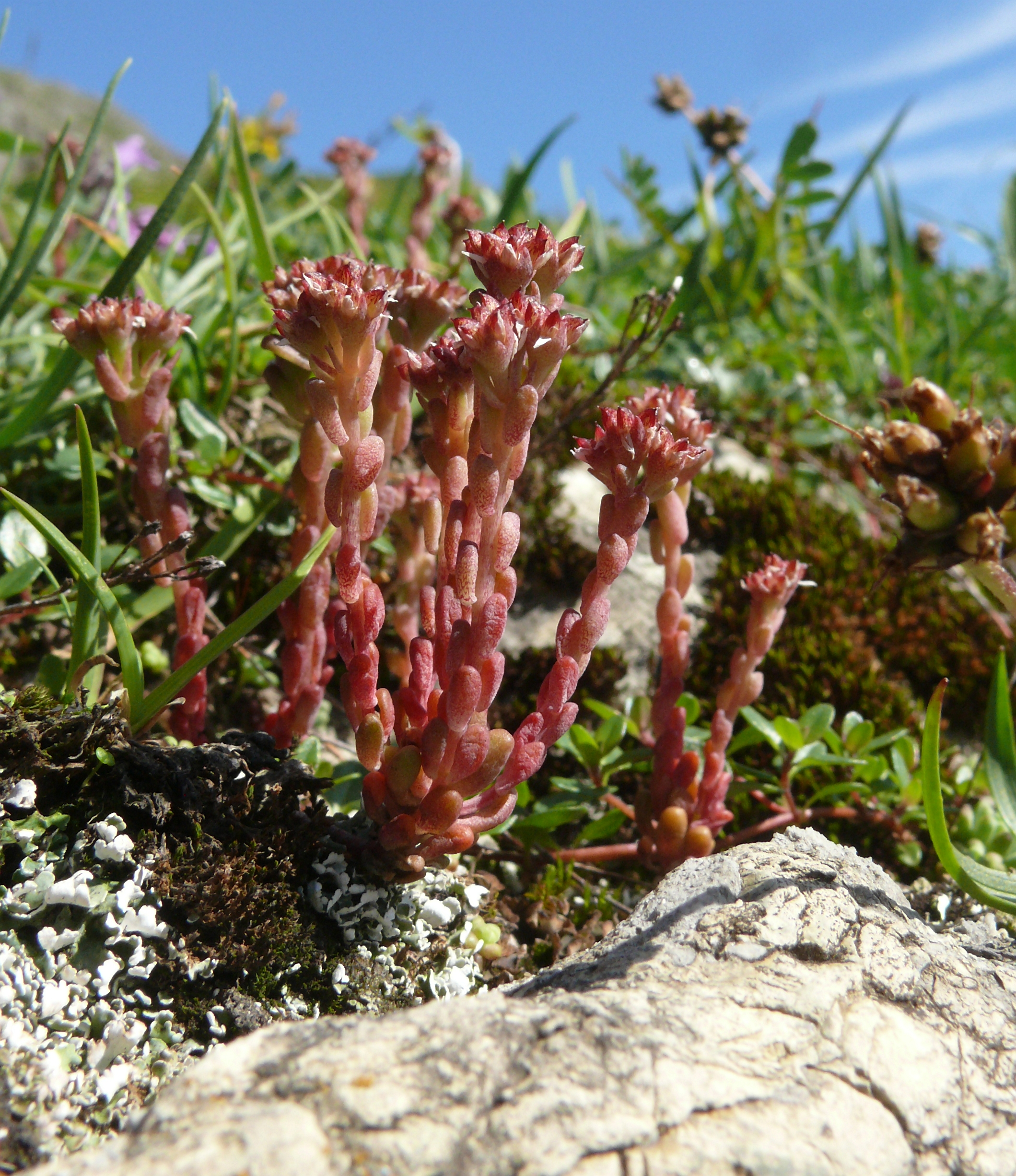 Sedum atratum, Allgäuer Alpen, Deutschland